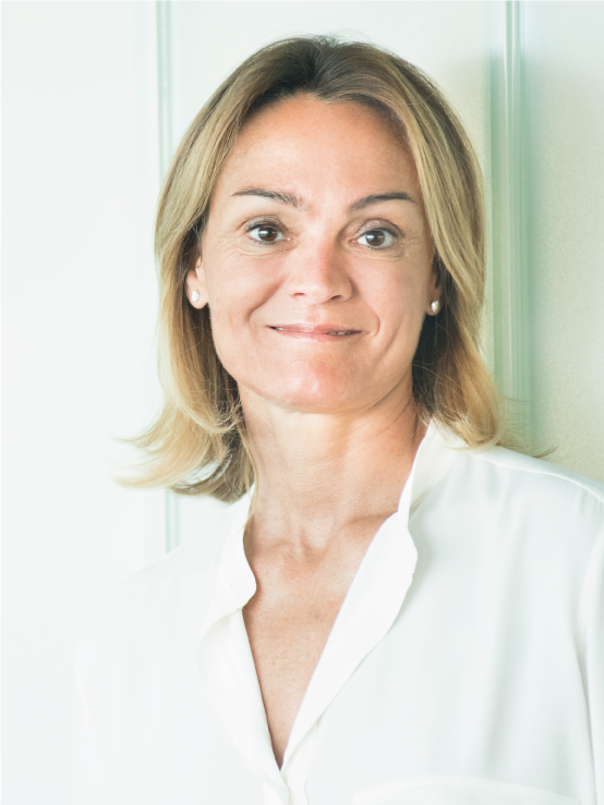 Foto de la presidenta de Coca-Cola European Partners